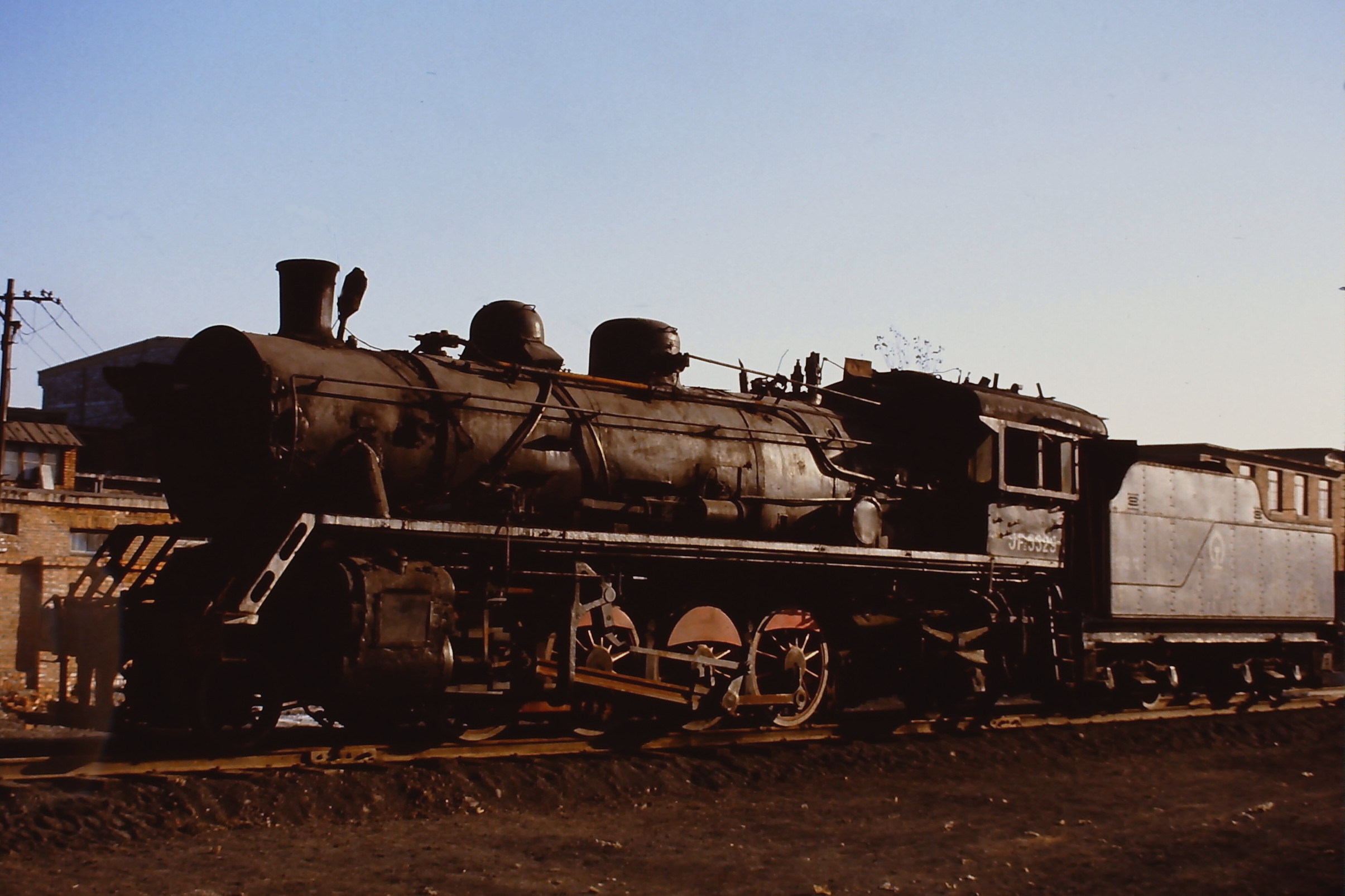 CNR JF6-3329 (Dampflokomotivmuseum Shenyang)